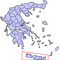 Крит и окружающие острова на карте Греции